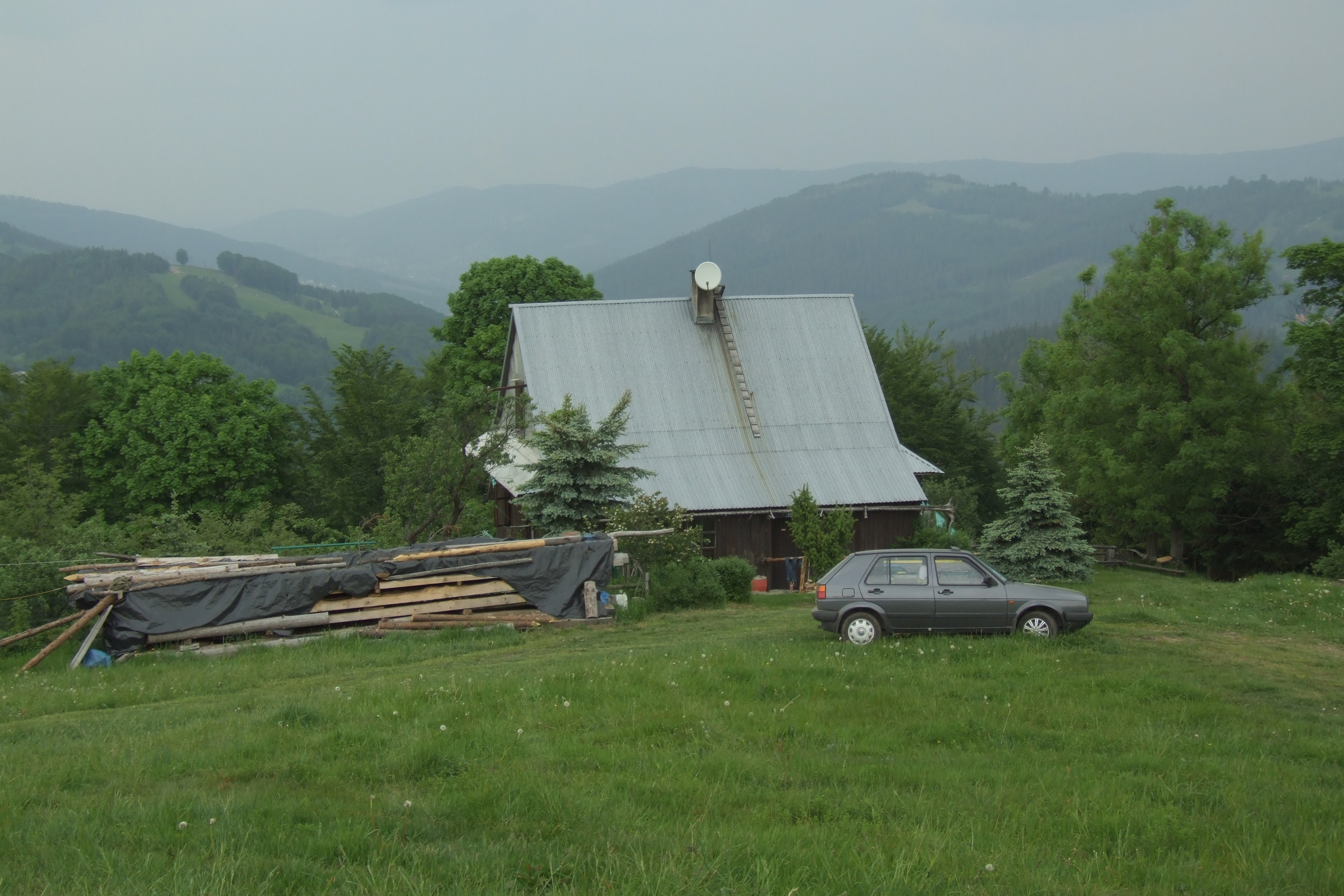 Telesforówka hostel in Beskid Śląski mountains